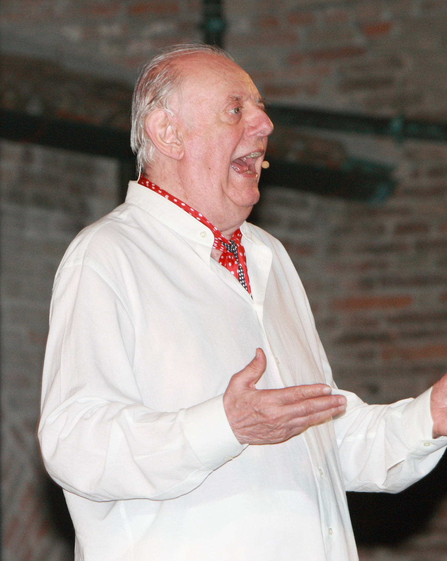 In occasione della rassegna Autori sotto le stelle che si tiene a Cesena, Dario Fo ha presentato il suo ultimo libro L'apocalisse rimandata, ovvero Benvenuta catastrofe!.